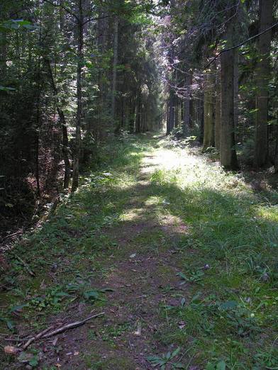 Miško kvartalinė Fotografavo Algirdas Mažeikių raj., Ubagyno miške, 2005 m., rugpjūčio 23 d.